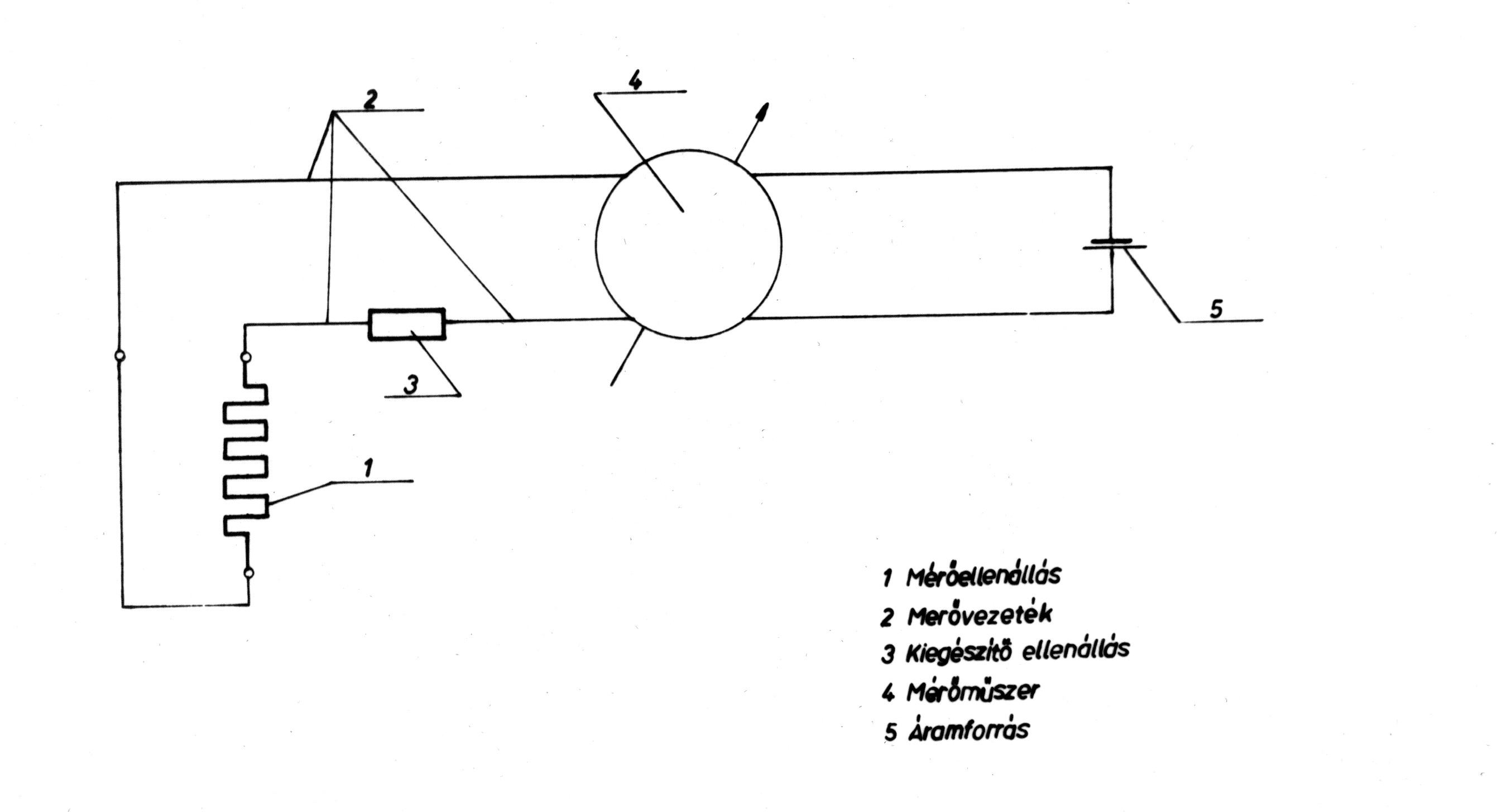 Ellenállásos hőmérsékletmérés elvi rajza